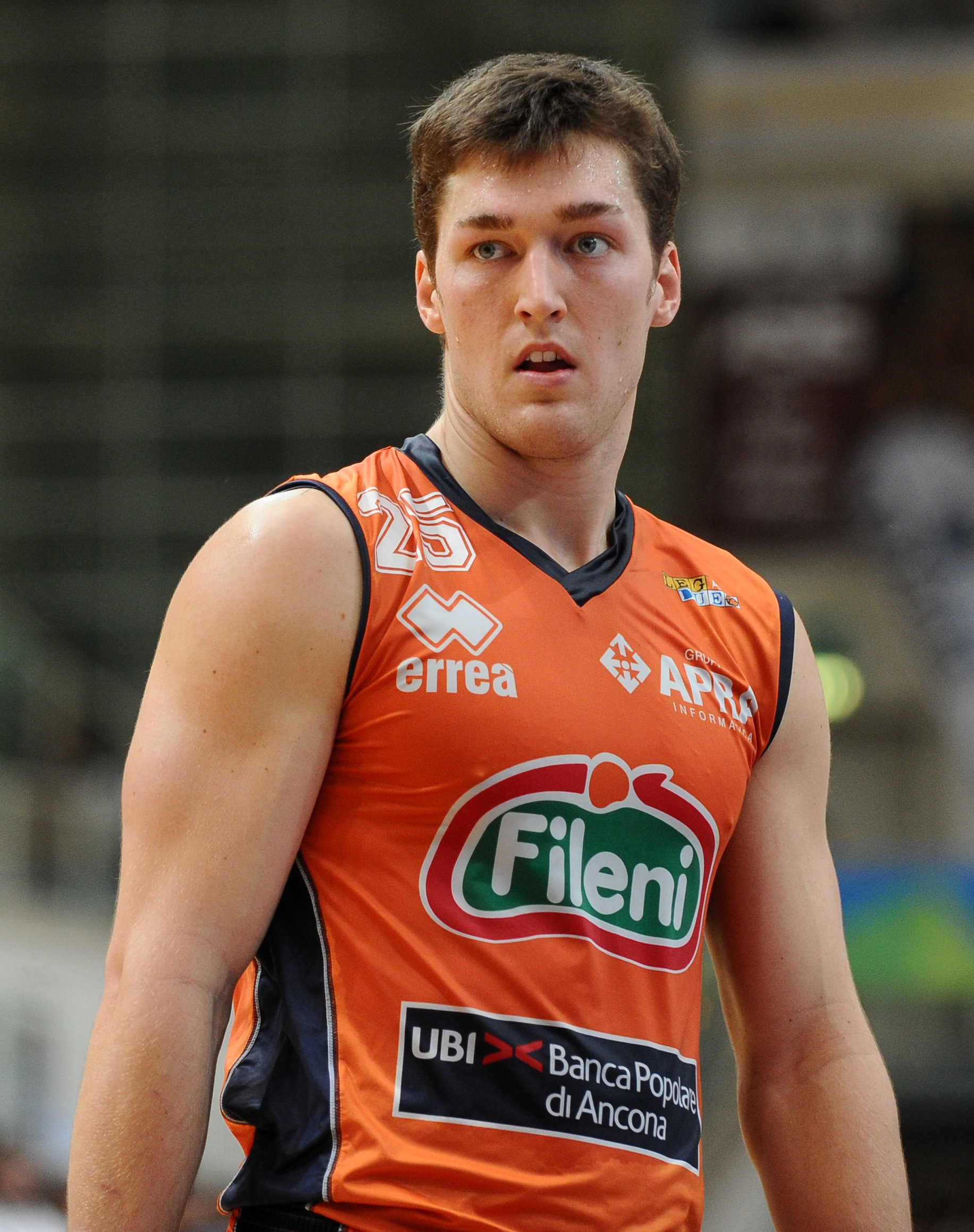 Jesse Sanders con la maglia dell'Aurora Basket Jesi al PalaTrento.